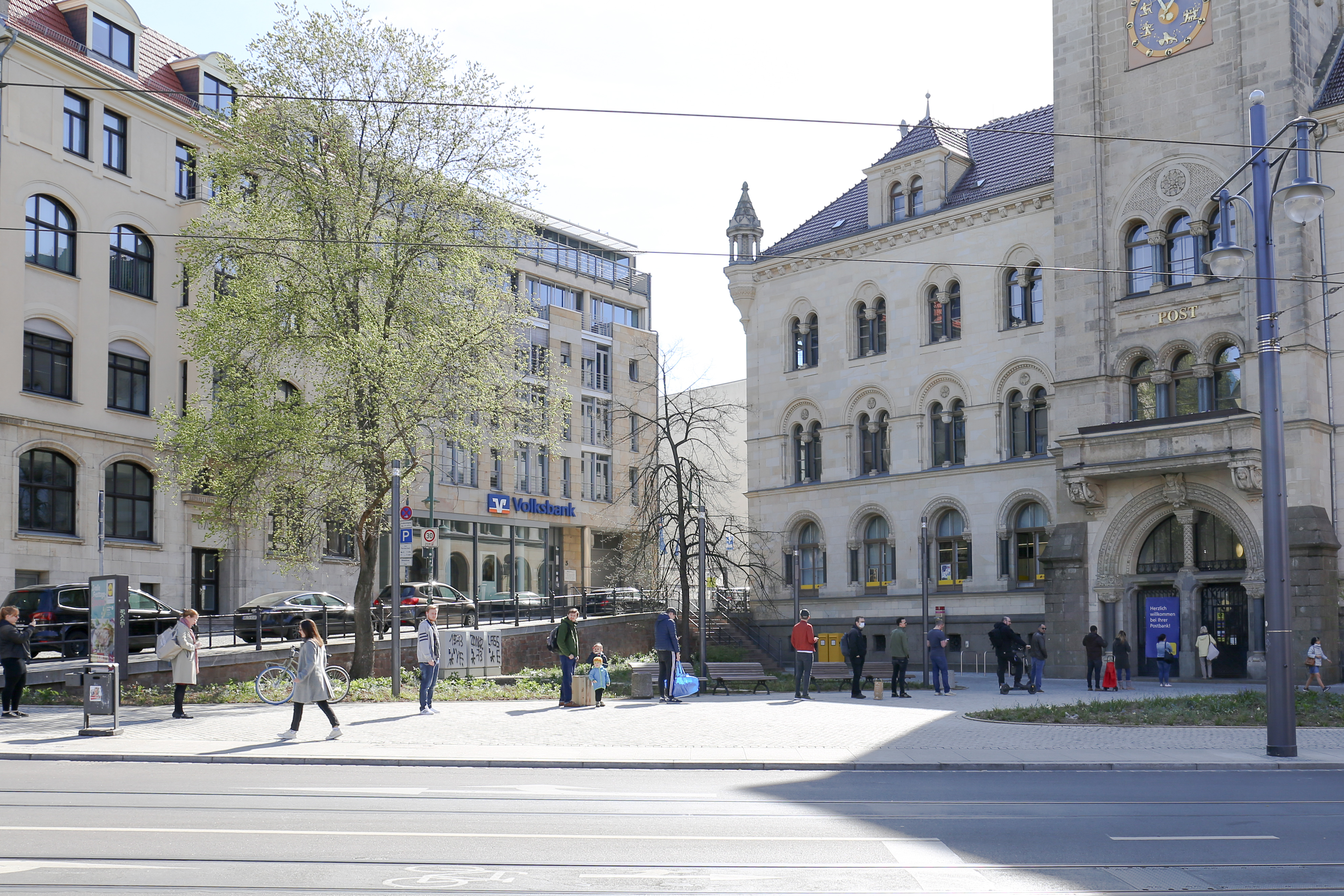 Vorkehrungen auf Grund der COVID-19-Pandemie in Halle (Saale).